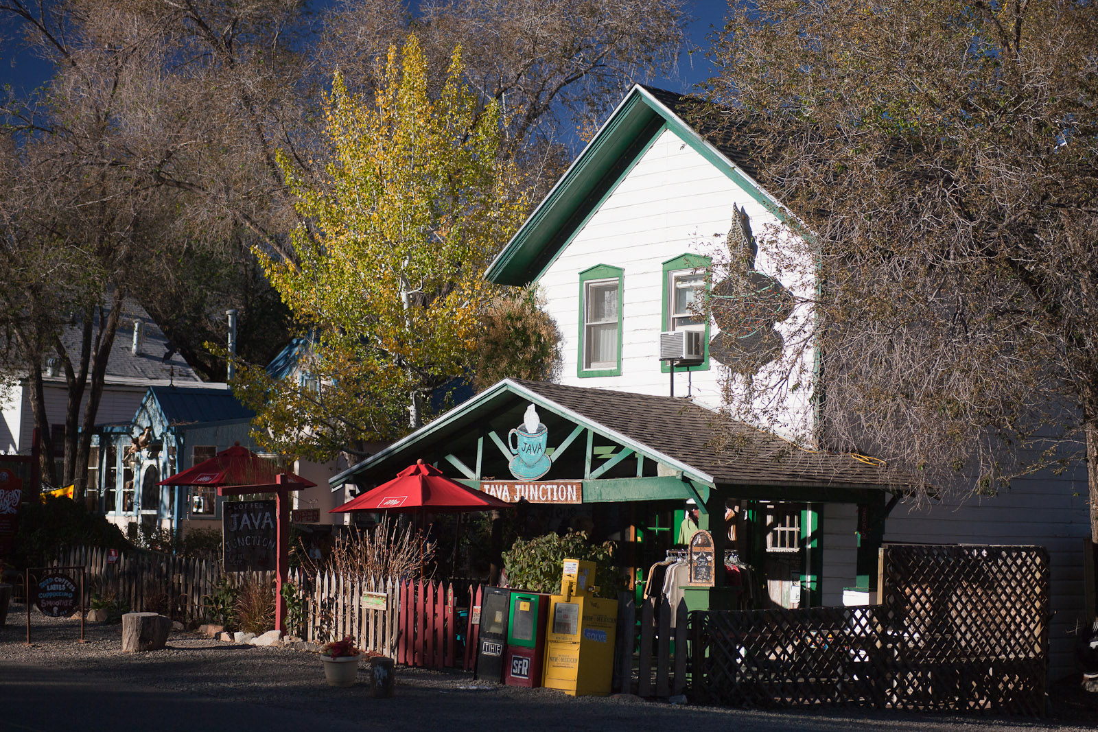 Madrid, NM